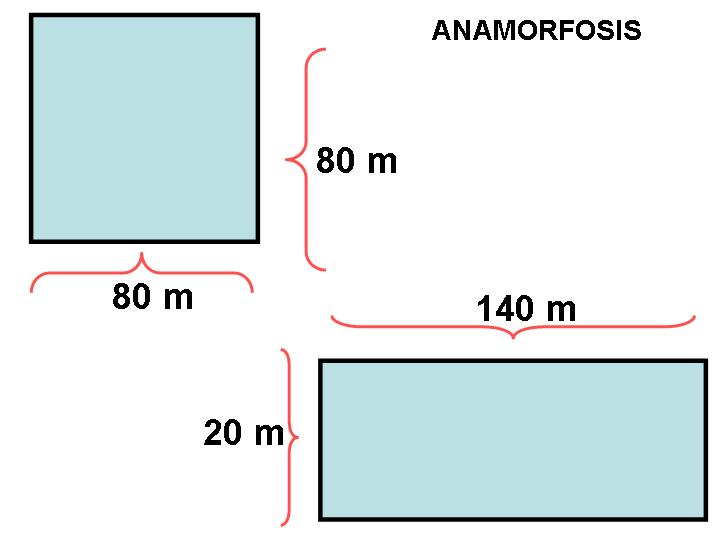 Transformación de un cuadrado a un rectángulo